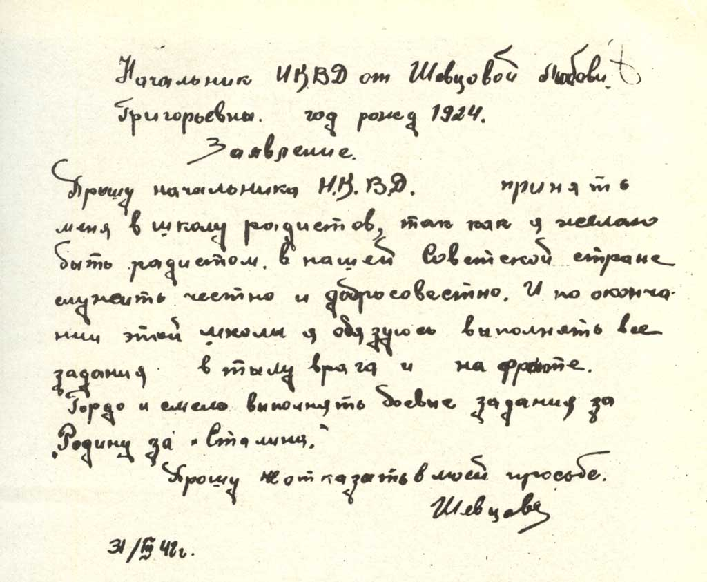 Заявление Любы о приеме в Ворошиловградскую школу подготовки партизан и подпольщиков (в школу радистов)